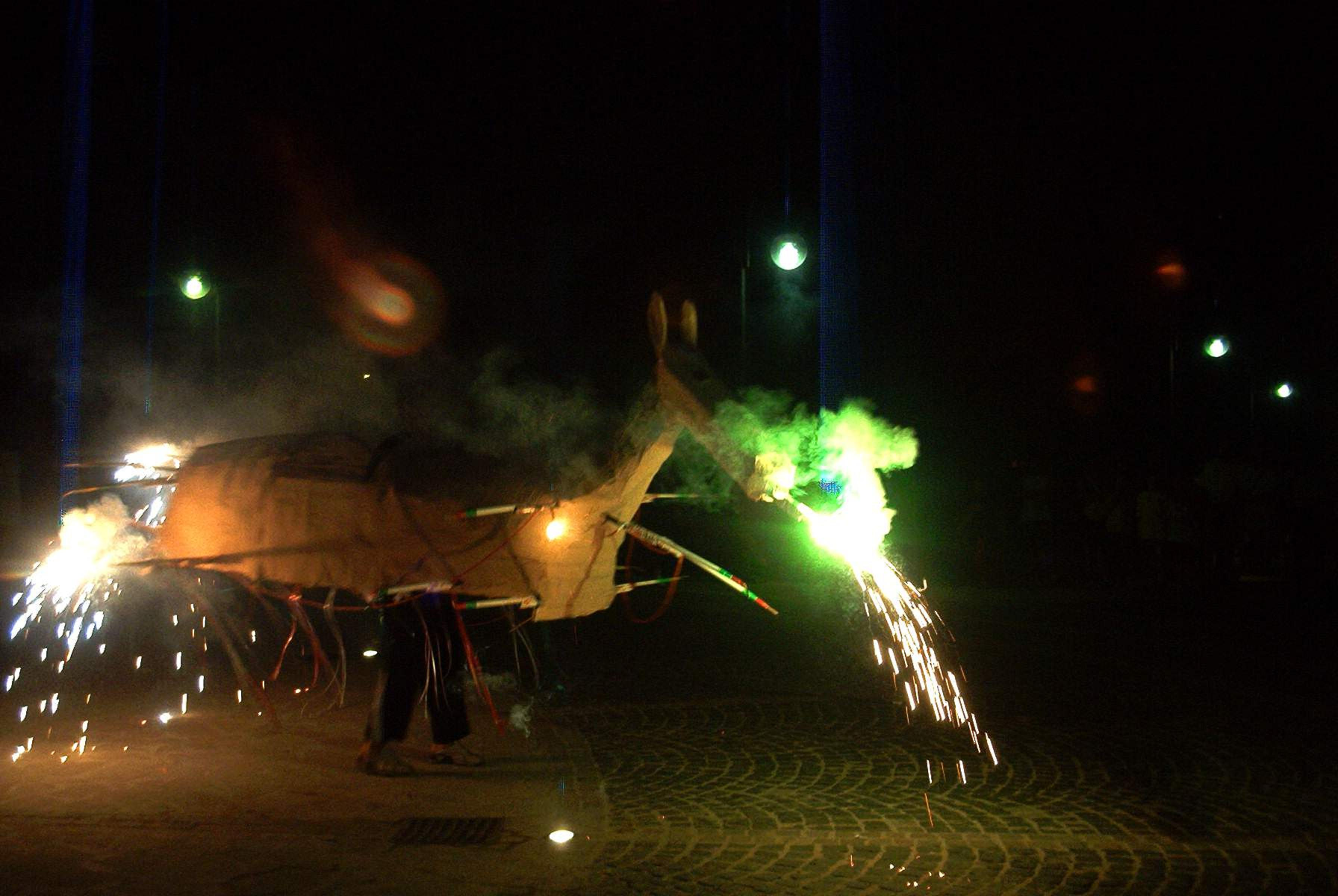 Io sottoscritto Luigi Salvatore Vadacchino, utente di Wikipedia sotto il nome di Lodewijk Vadacchino, cedo l'immagine SDC1196.jpg a Wikimedia Italia, sotto licenza CC-BY-SA, con il nome Campora_San_Giovanni_2009_-_Festa_du_Ciucciu.jpg L'Immagine fotografica raffigurantela tradizionale ballata del "Ciuccio" del 24 giugno cadanualle. Porgo come sempre i miei distintissimi saluti, con l'augurio che possiate venirmi a far visita. Vostro come sempre--Lodewijk Vadacchino (msg) 16:25, 31 lug 2009 (CEST)